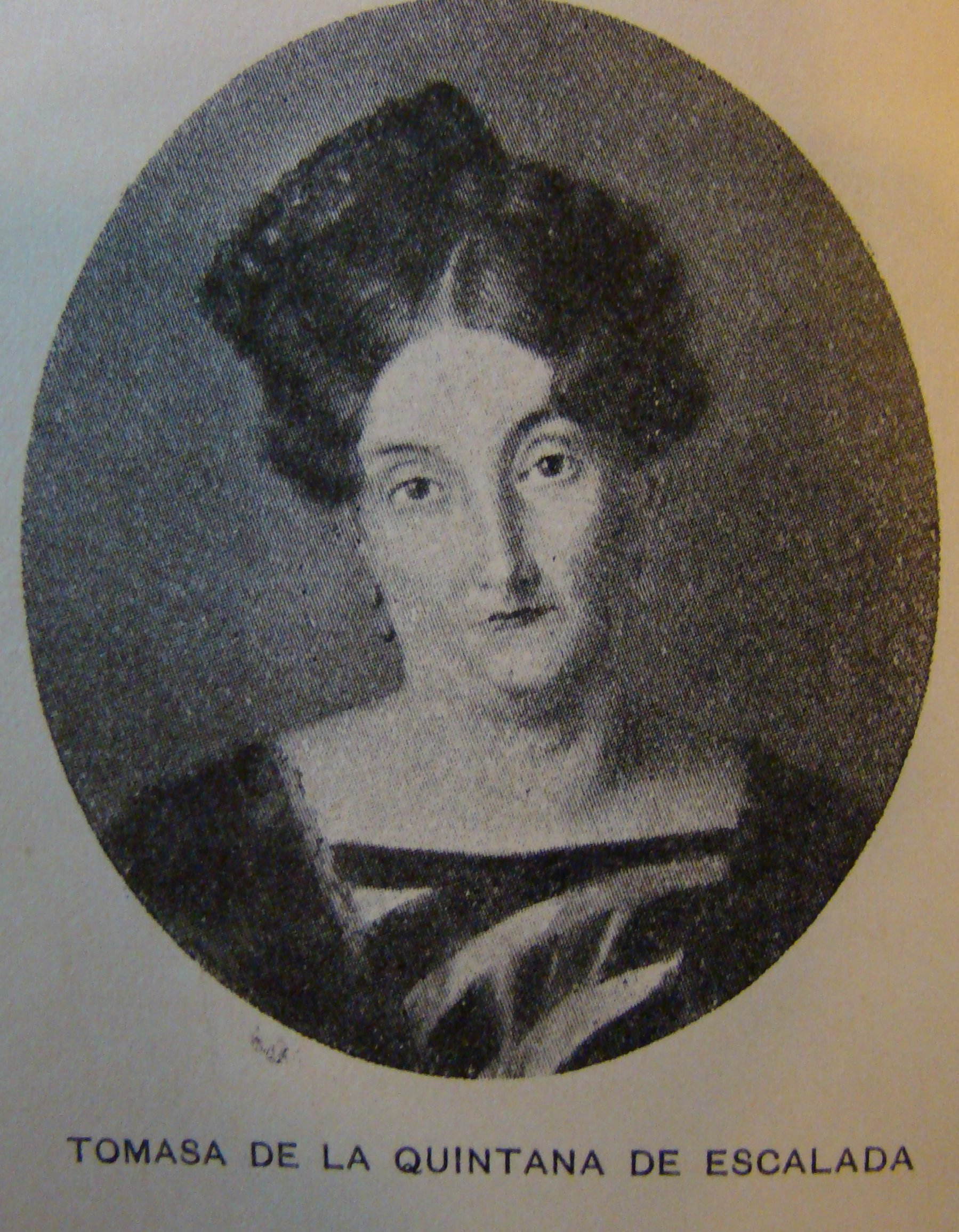 Tomasa de la Quintana de Escalada, Patricia Argentina